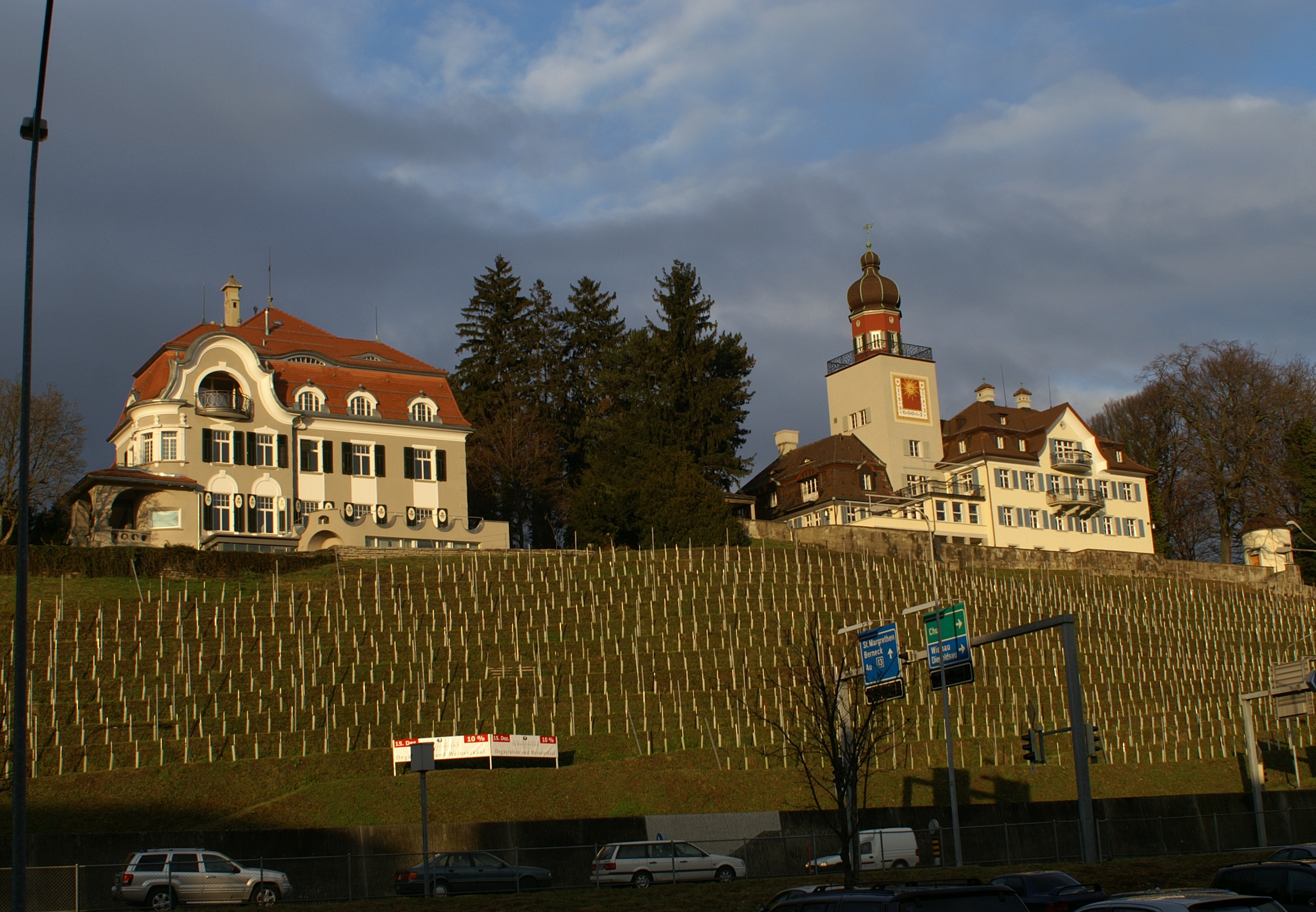 Das Schloss Heerbrugg in CH-9436 Balgach, gilt zweifellos als Ursprung von Heerbrugg. Anscheinend bestand bereits zu Römerzeiten ein Kastell, auf deren Grundmauern im Jahre 1077 die Feste "Herburch" erbaut wurde, welche aber später abbrannte. Das bestehende Schloss ohne Turm stammt etwa aus dem Jahre 1775. Bis 1796 bestand Heerbrugg lediglich aus dem Schloss mit drei Häusern. Die Ebene war gänzlich unbewohnt. Quelle: [1] Die Geschichte vom Schloss Heerbrugg ist auch verknüpft mit der Geschichte der Unternehmerdynastie Schmidheiny. Die Geschichte der erfolgreichen Familie beginnt mit dem Kauf des Schlosses durch Jacob Schmidheiny I. im Jahre 1867. Bis zum 31.12.2004 war das Schloss im Besitze der Familie Schmidheiny.